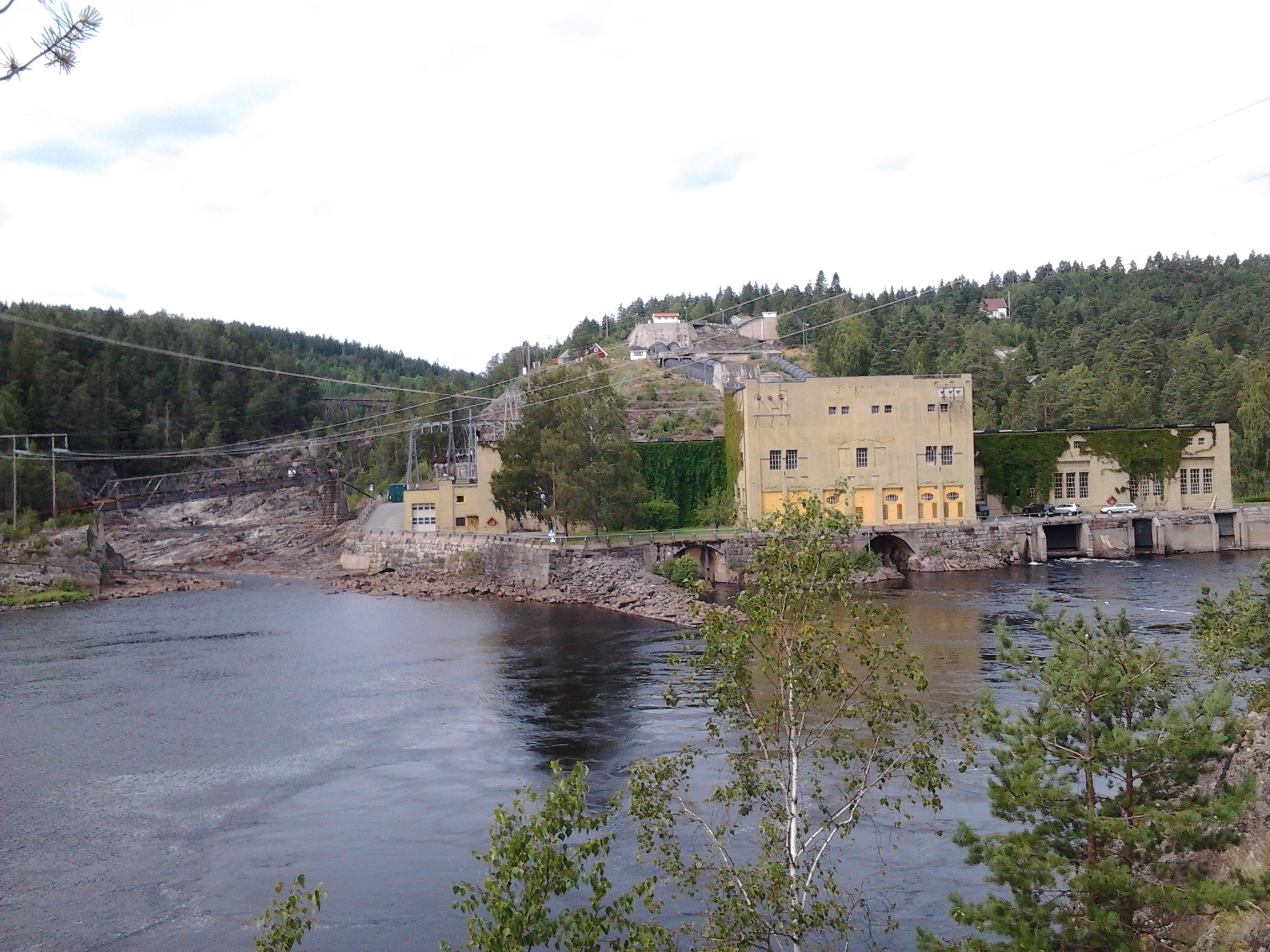 Bøylefoss kraftverk i Froland, Norge